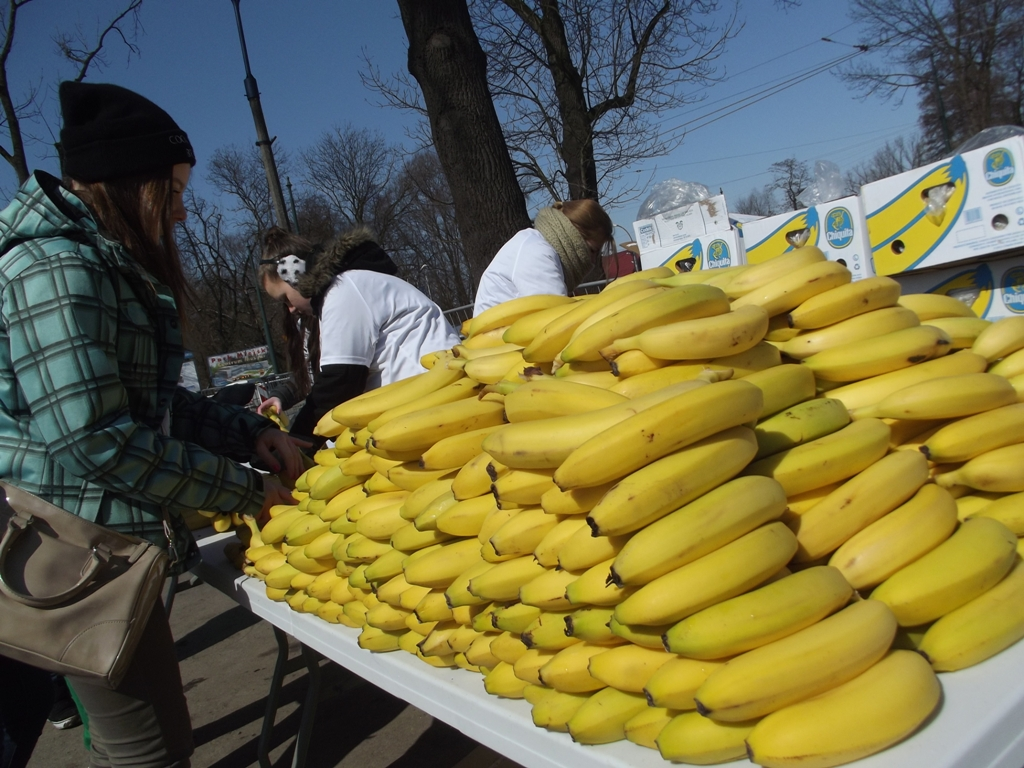 Zdjęcie zrobione podczas X Półmaratonu Marzanny w Krakowie.